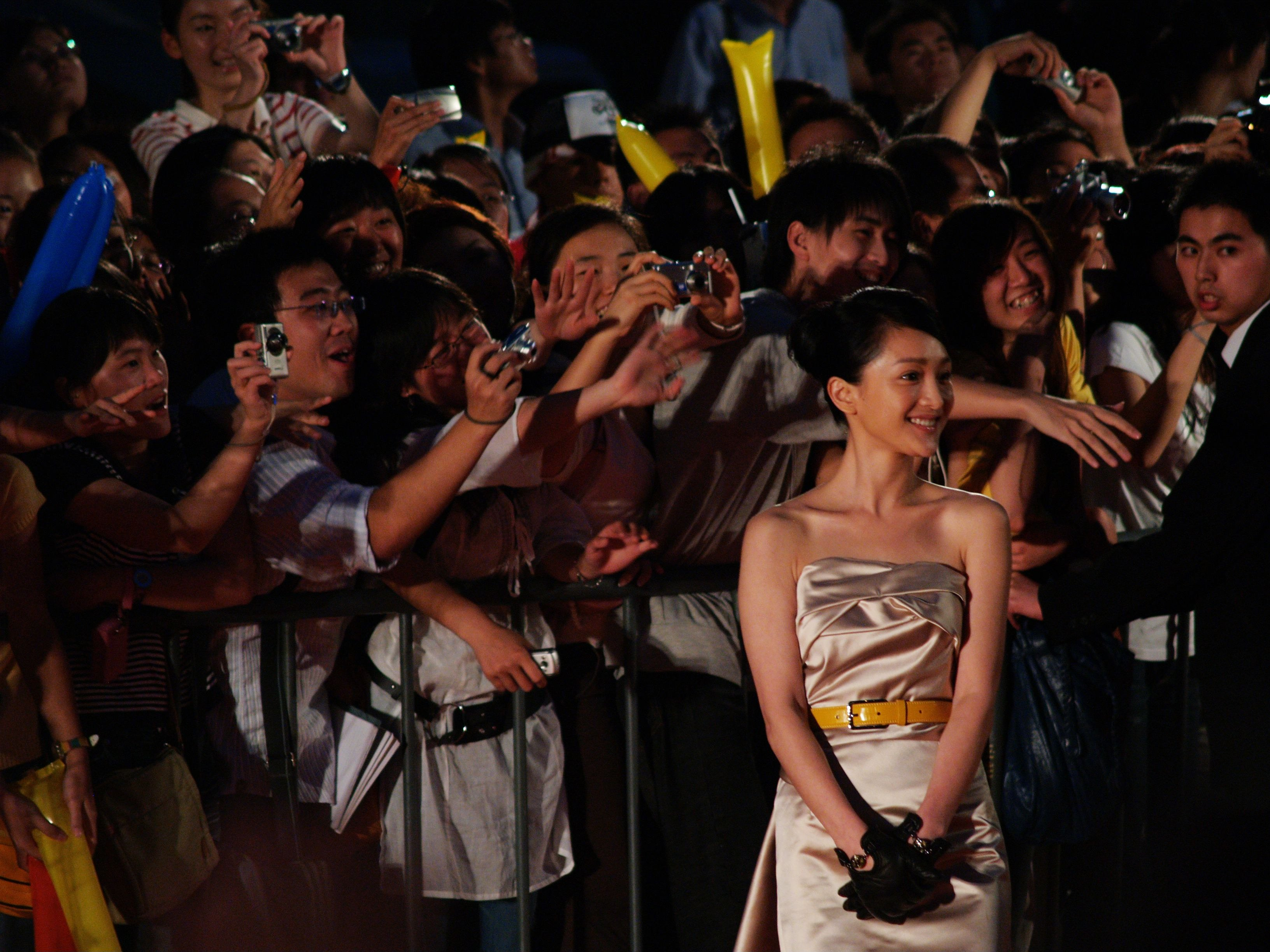 Zhou Xun 周迅